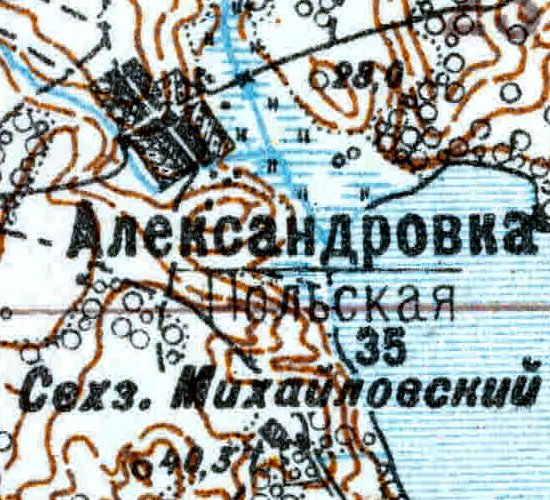 Топографическая карта Ленинградской области, квадрат VIc-28 (Луга), деревня Александровка